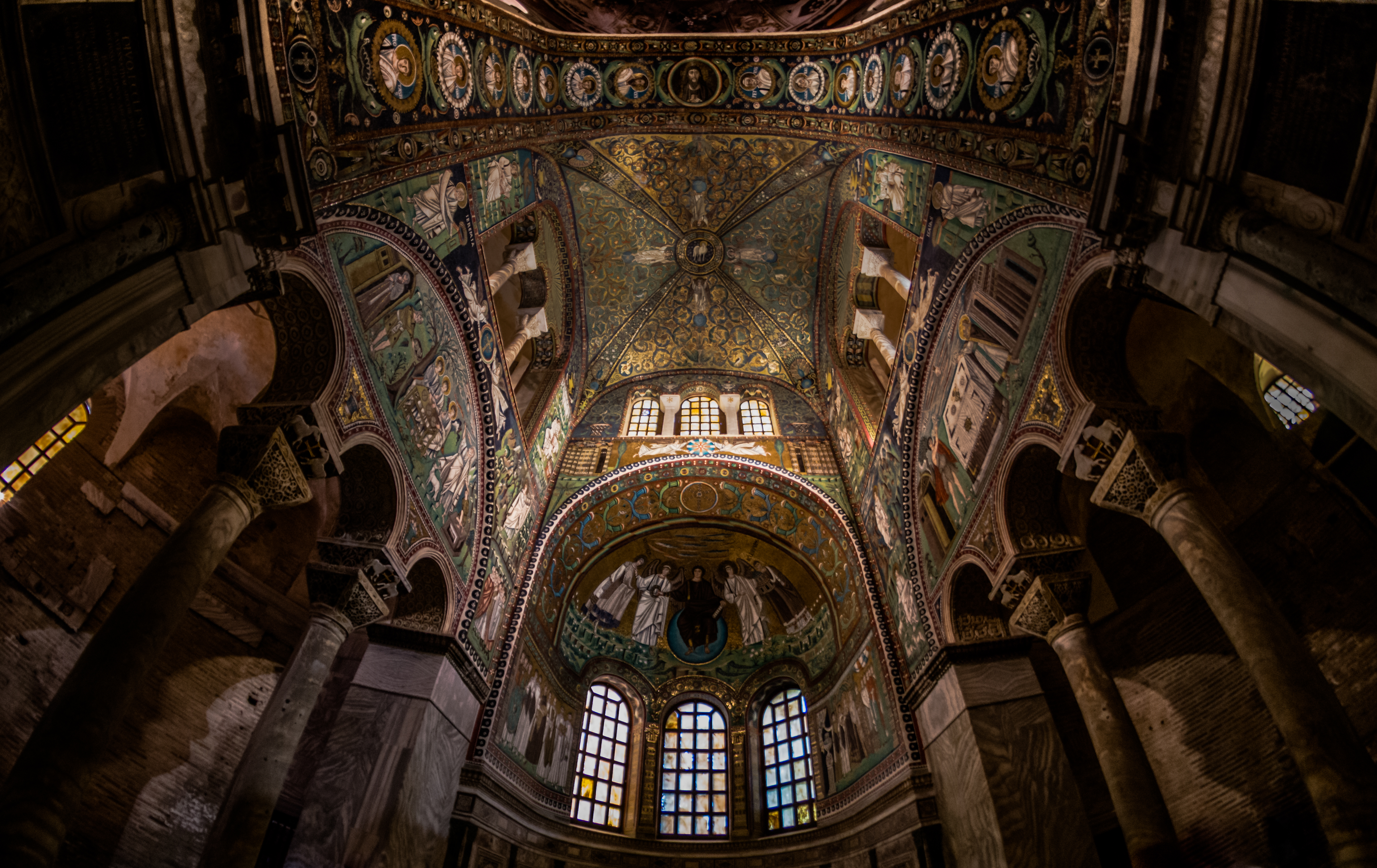 Abside della Basilica